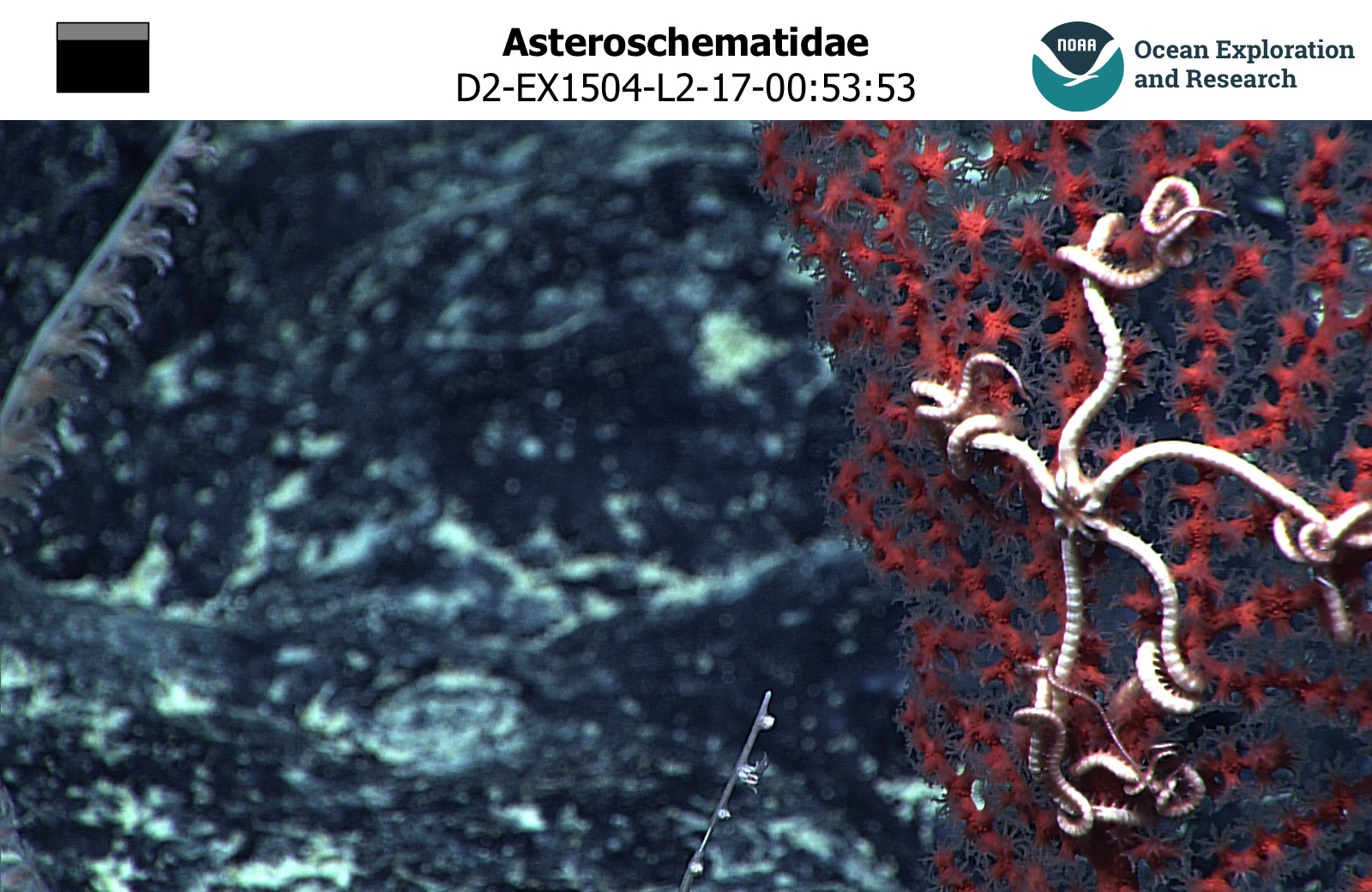 Une ophiure de la famille des Asteroschematidae (non identifiée) observée au large d'Hawaii à plus de 1000m de profondeur par la mission Okeanos Explorer.